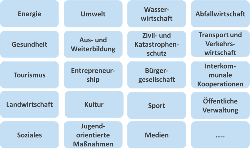 Themen der DGV